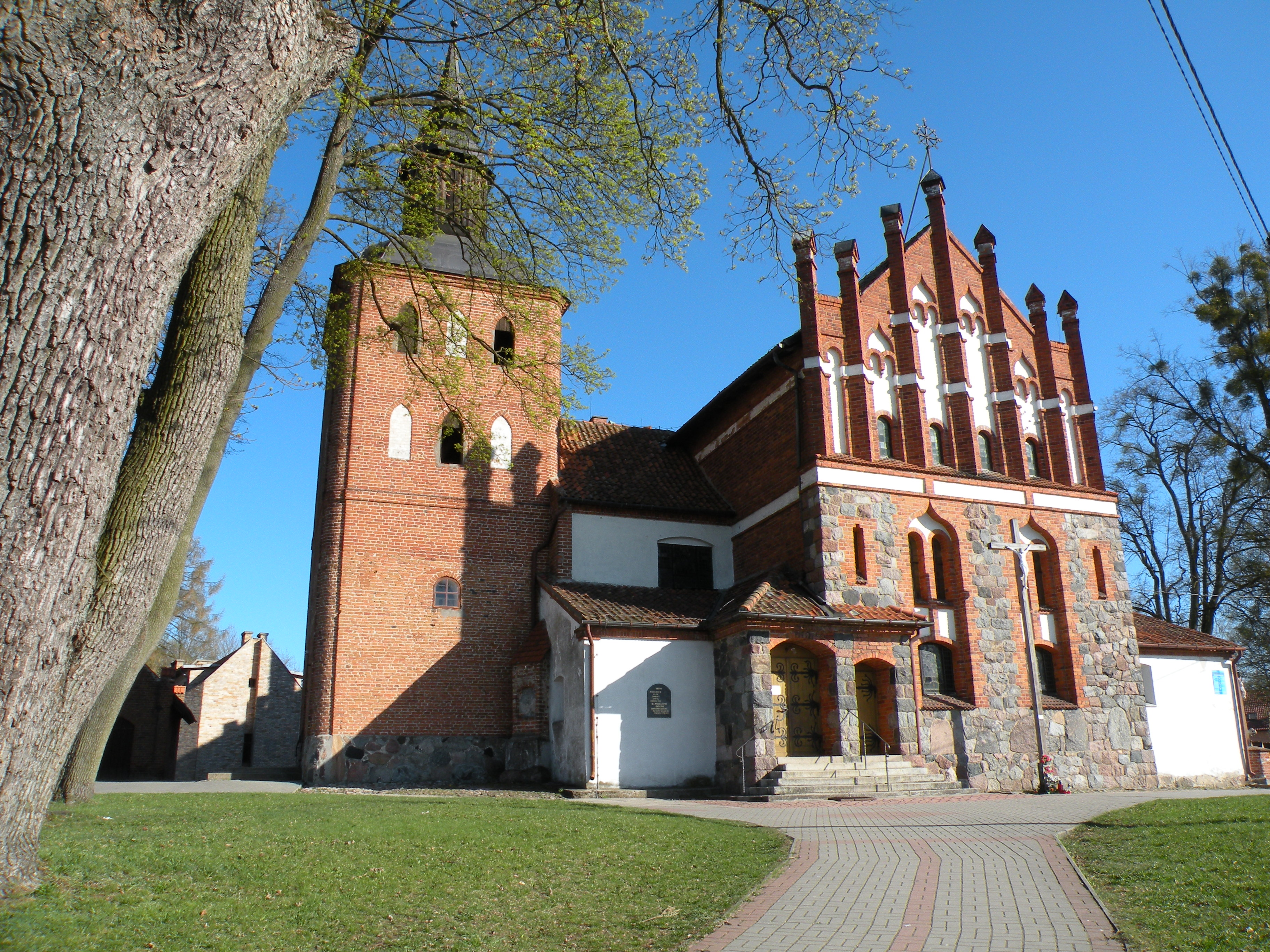 Jonkowo - kościół parafialny p.w. św. Jana Chrzciciela, widok od drogi, od frontu (zabytek nr rejestr. A-838)